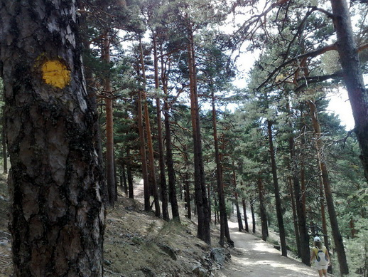 Camino Schmidt- Señalización marcas amarillas, al inicio de la zona bosque, puerto de Navacerrada.